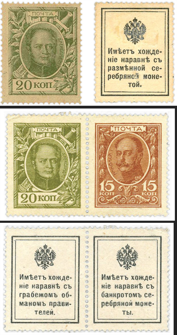 Deutsche Propagandafälschungen für Russland 1915/1917. Oben die Originalmarke, Reihe zwei und drei die Deutschen Fälschungen